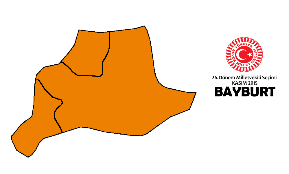 Kasım 2015 seçimleri